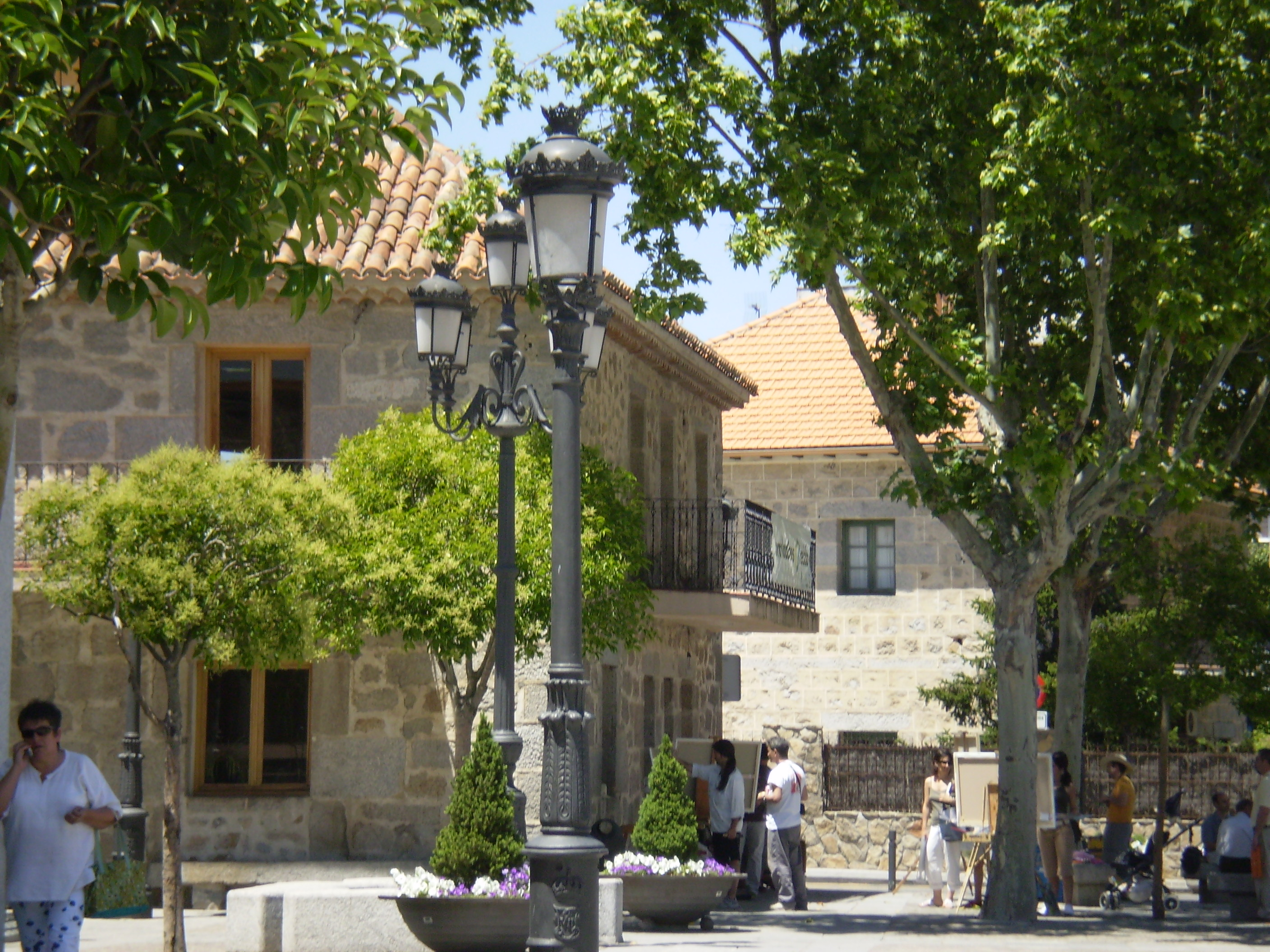 Plaza de la Constitución. Torrelodones, Madrid, Spain